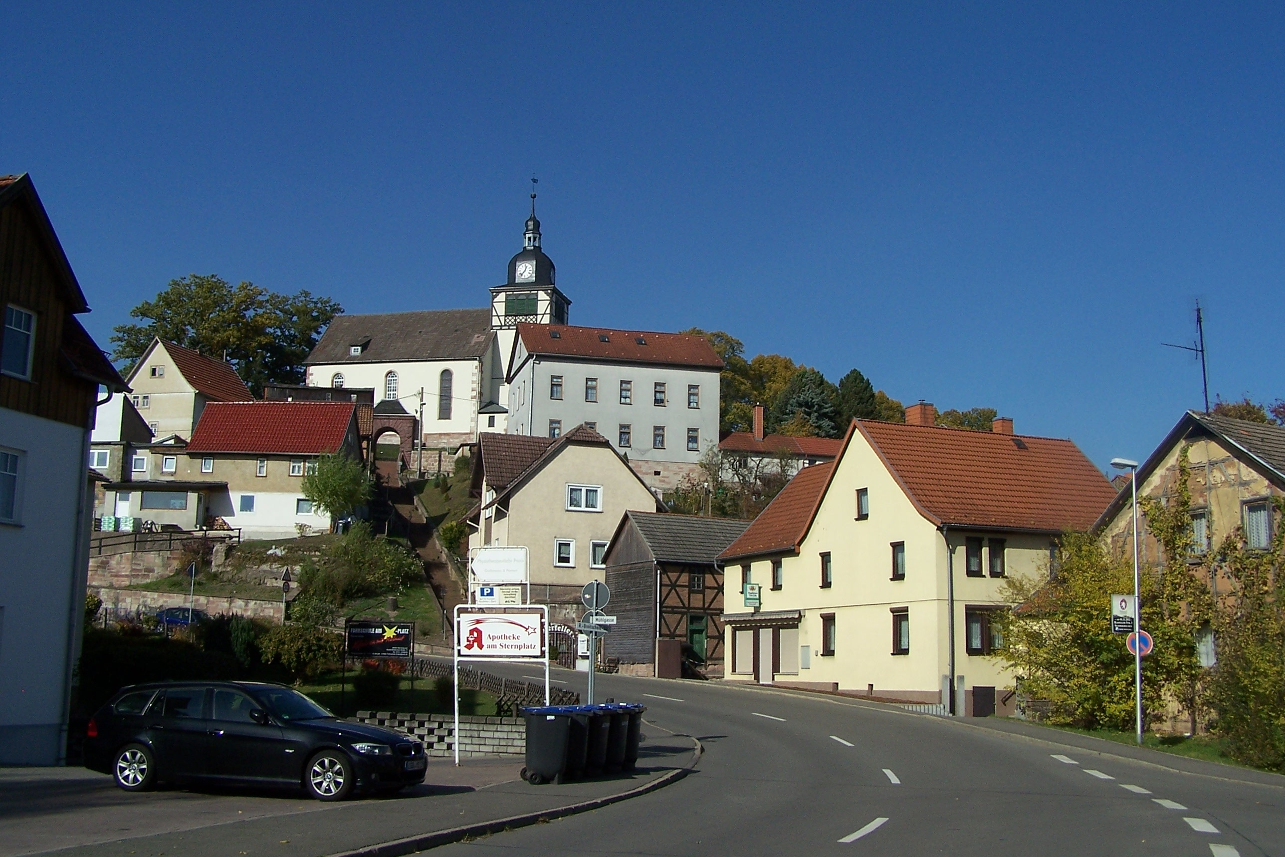 Districts of Schmalkalden